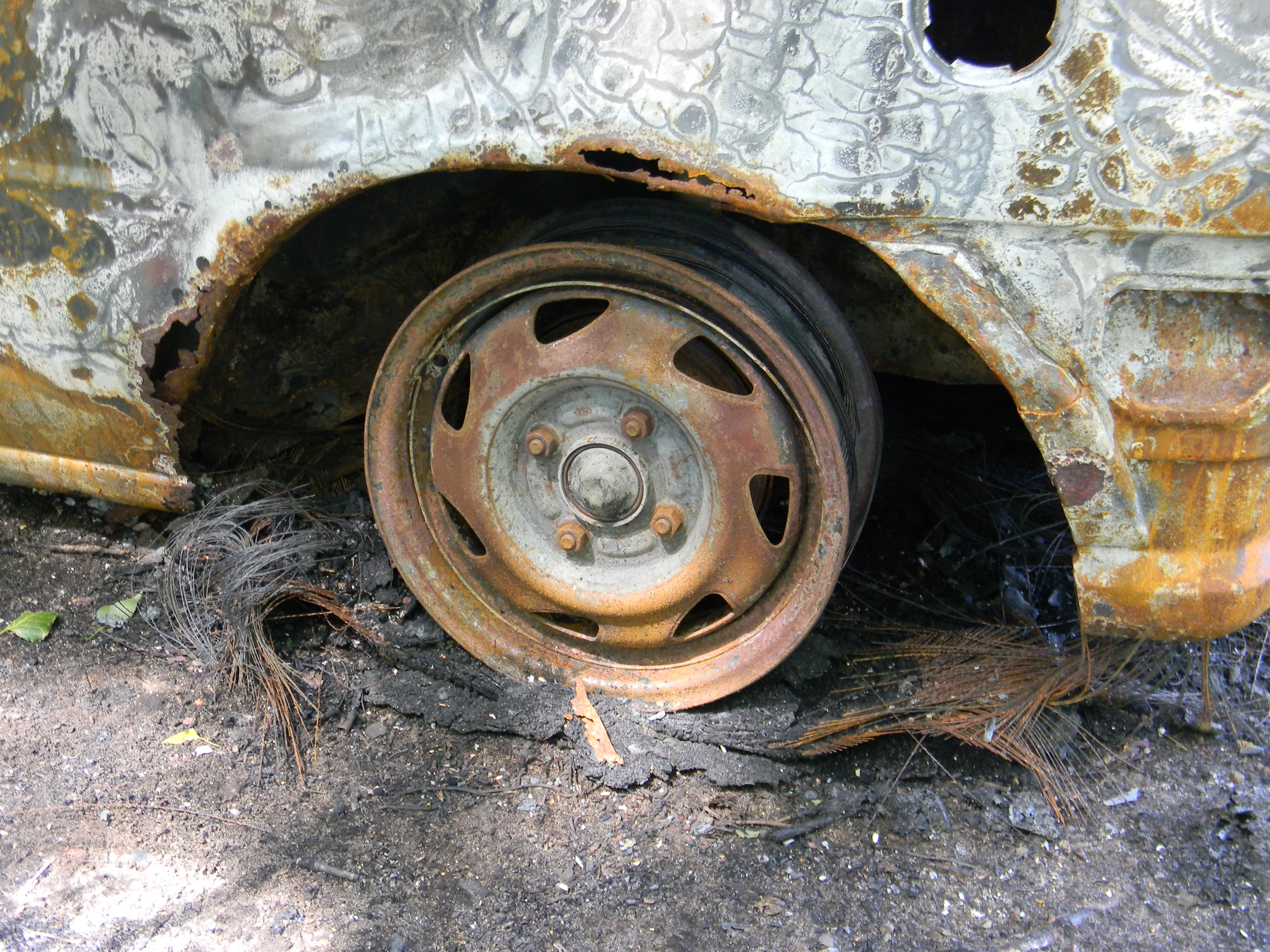 Détail d'un pneumatique de voiture brûlé.